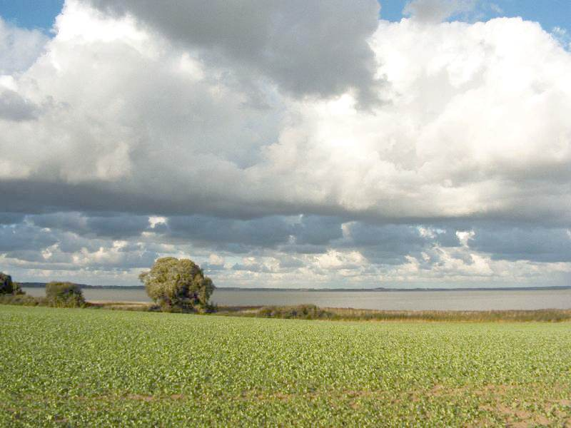 Lake Arresø, Frederiksværk,DK-3000 Frederiksværk. South West side from the road Hillerødsvej (route 16).